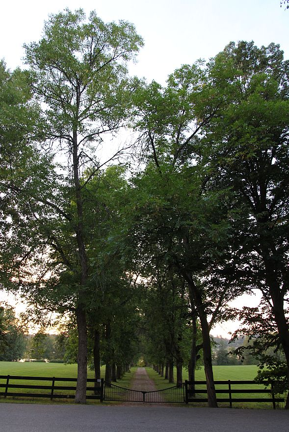 Puukuja Jupperintieltä (Osa Kuninkaantietä) Pitkäjärvelle, Jupperi, Espoo, aivan Espoon ja Vantaan rajalla. Elokuu 2013. Huom: Muista säilyttää viittaus kuvaajaan, mikäli käytät kuvaa.